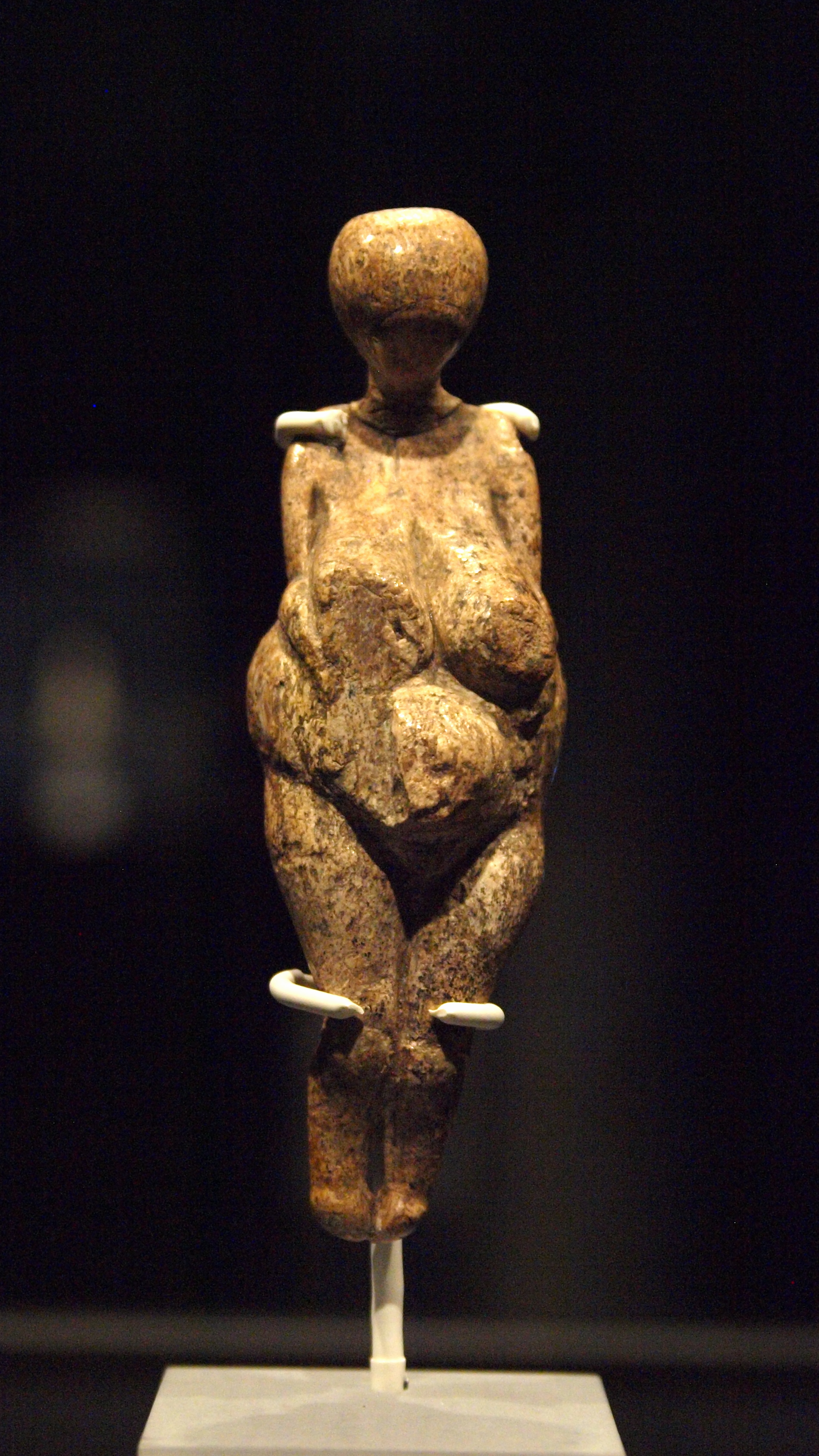 Frauenstatuette von Kostenki, Mammutelfenbein, Gravettien ca. 25.000 BP, Original, ausgestellt im Archäologischen Museum Hamburg (Eiszeiten - Die Kunst der Mammutjäger vom 18. Oktober 2016 bis 14. Mai 2017). Aufbewahrungsort sonst Kunstkammer Sankt Petersburg, Russland.